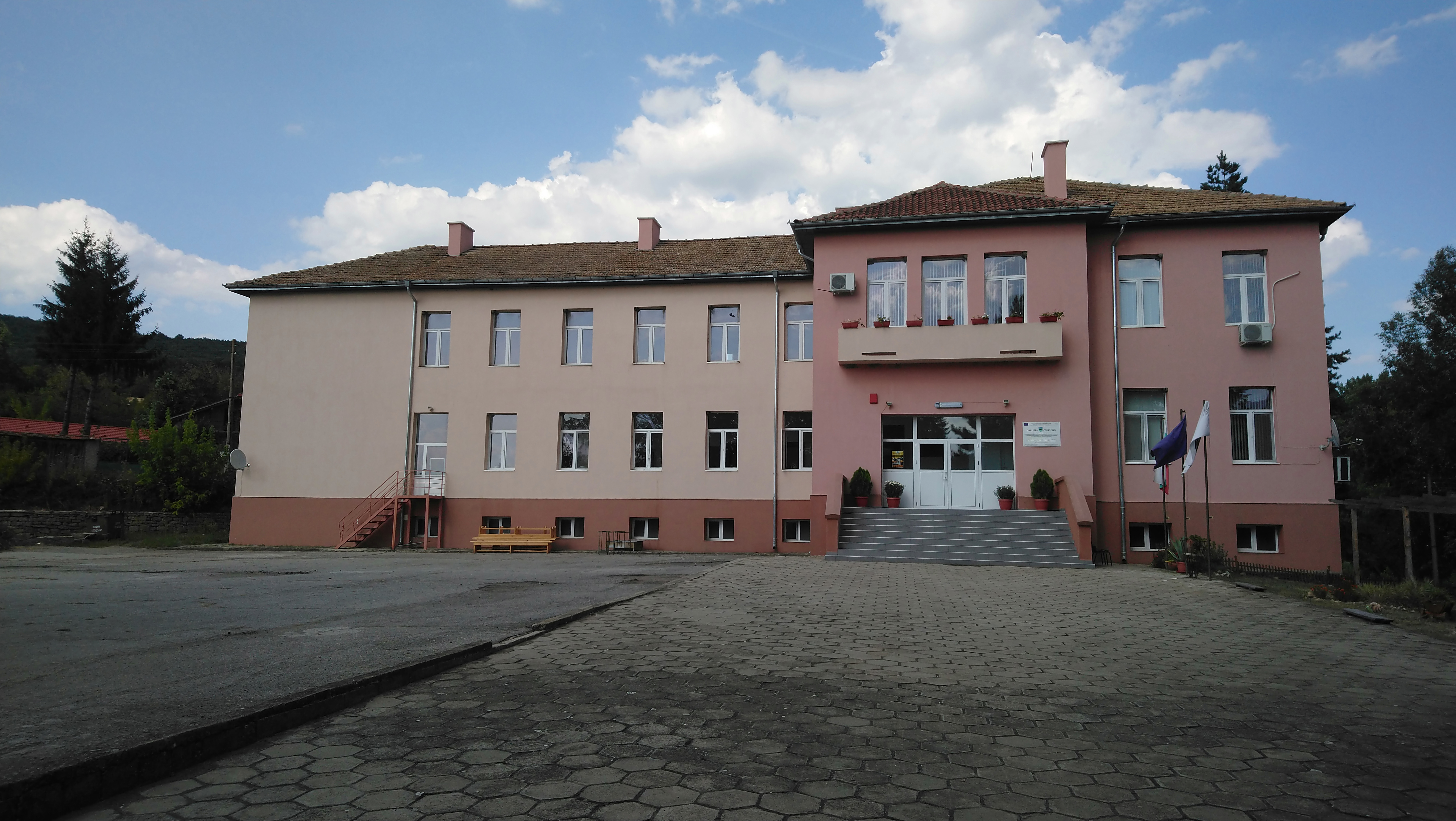 Veselinovo (Shumen Province): chitalishte "Saznanie 1927"